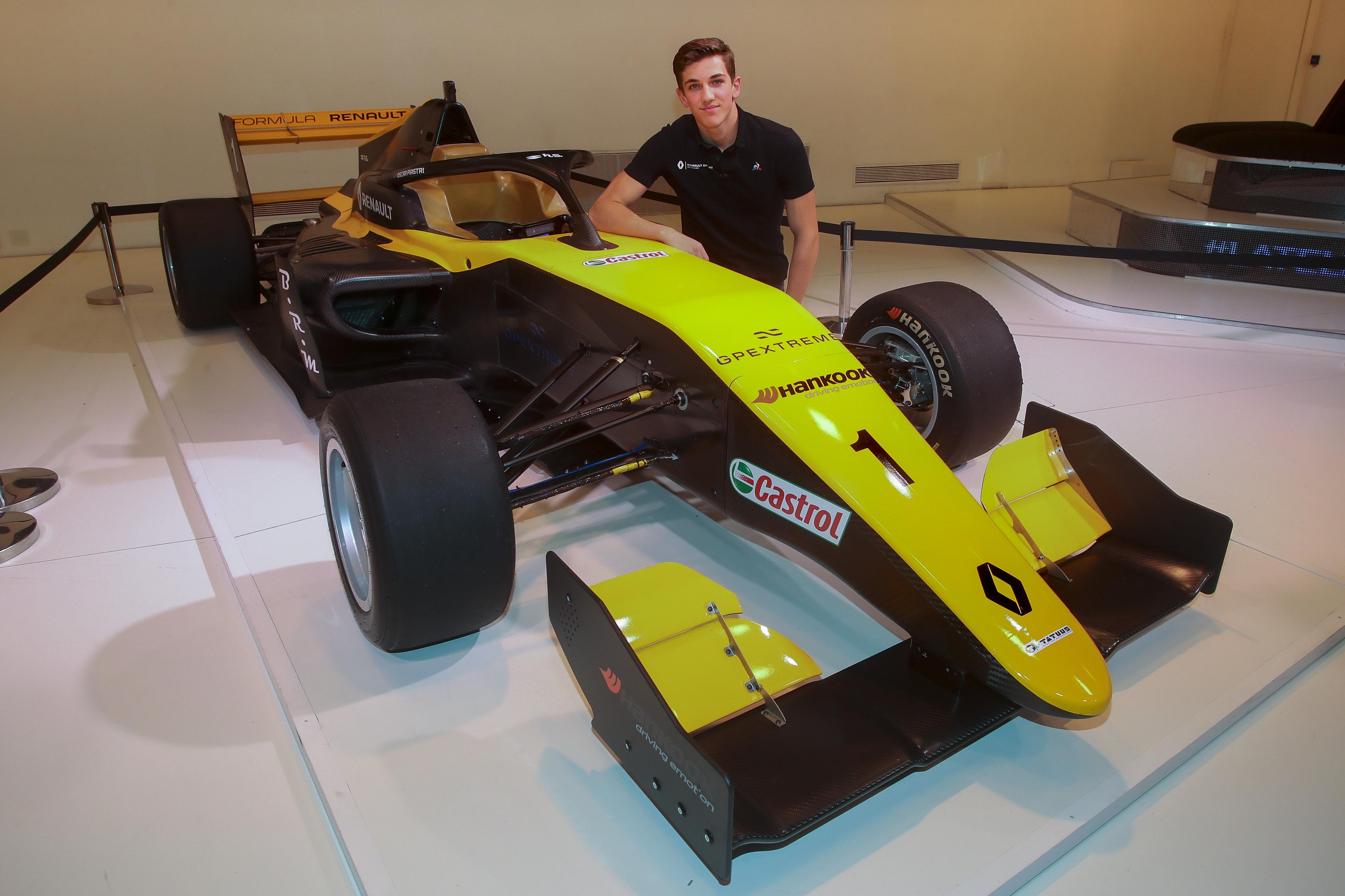 Photographie d'Hadrien David, à côté de la nouvelle Formule Renault Eurocup de 2020 à l'Atelier Renault.